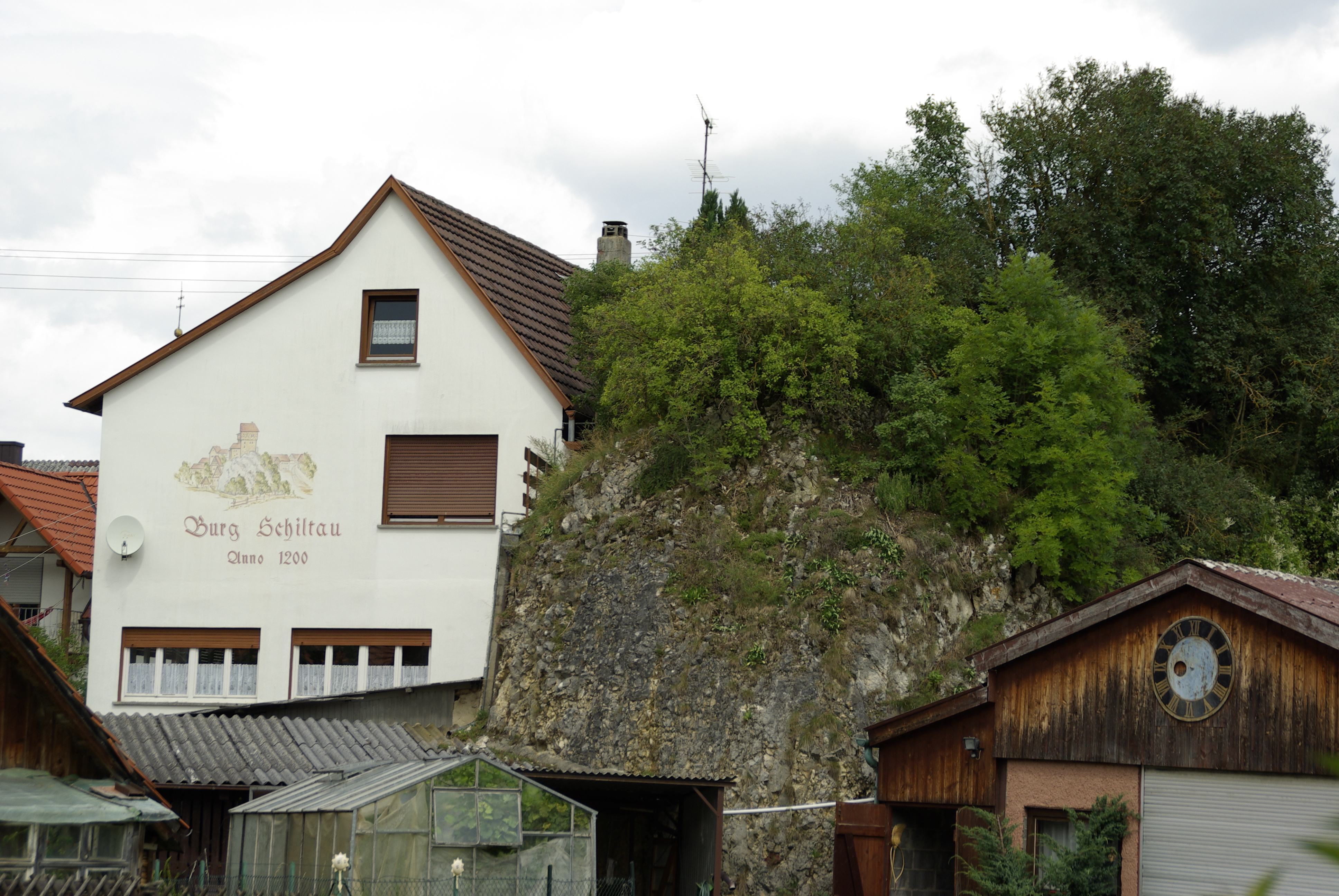 ehemaliger Standort der Burg Schiltau